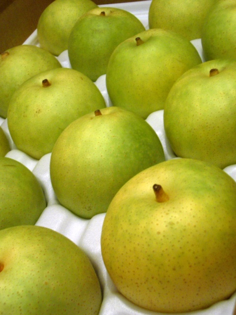 二十世紀梨Nijusseiki Nashi (Pears)